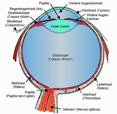 Kolorierte Grafik, Horizontalschnitt durch das menschliche Auge nach Meyers Konversationslexikon 1888